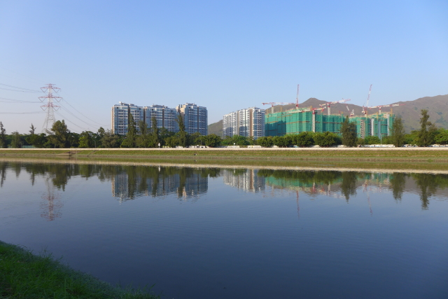 Park Vista